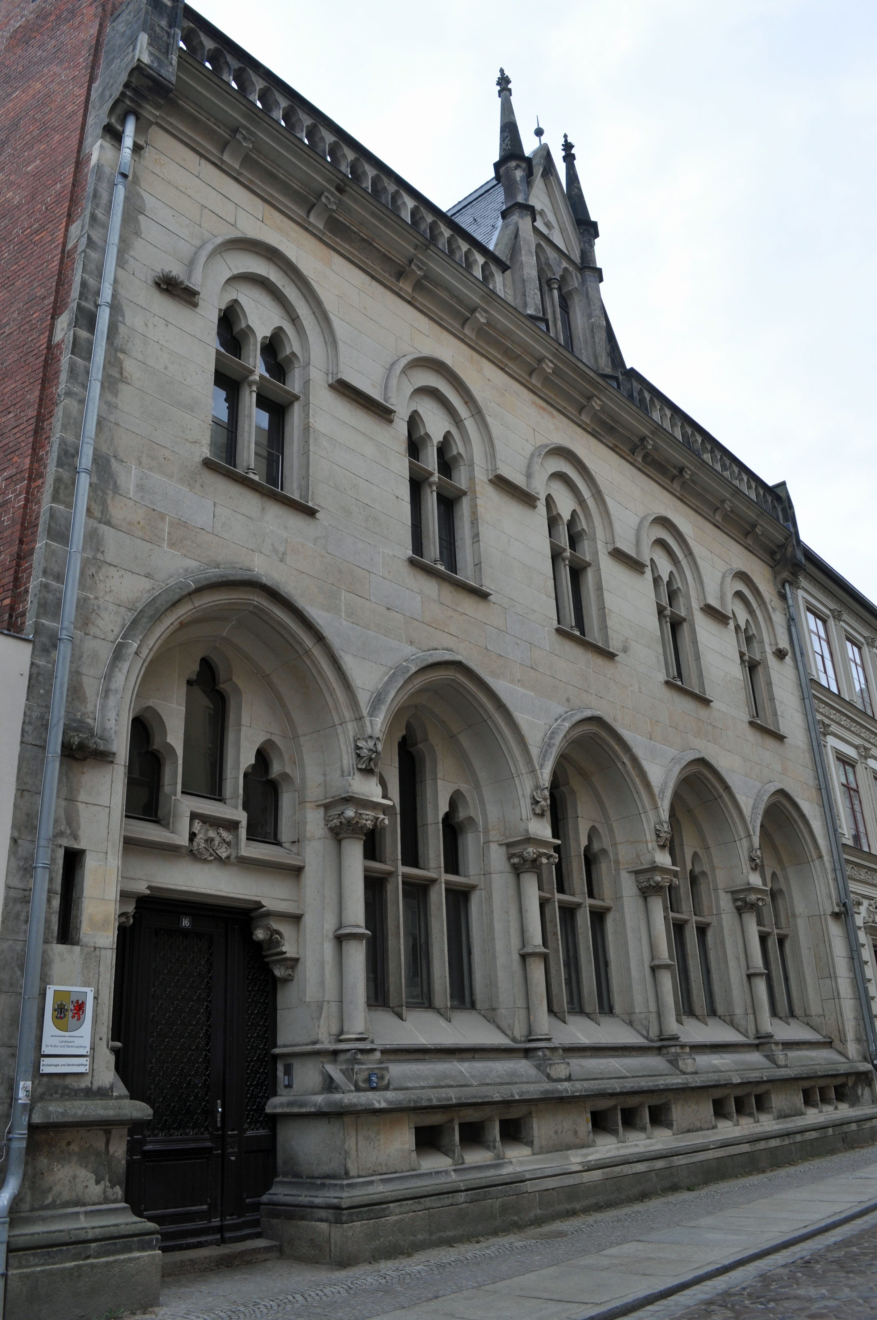 Gebäude bzw. Gebäudedetail in Stralsund. Straße und Hausnummer siehe Dateiname.